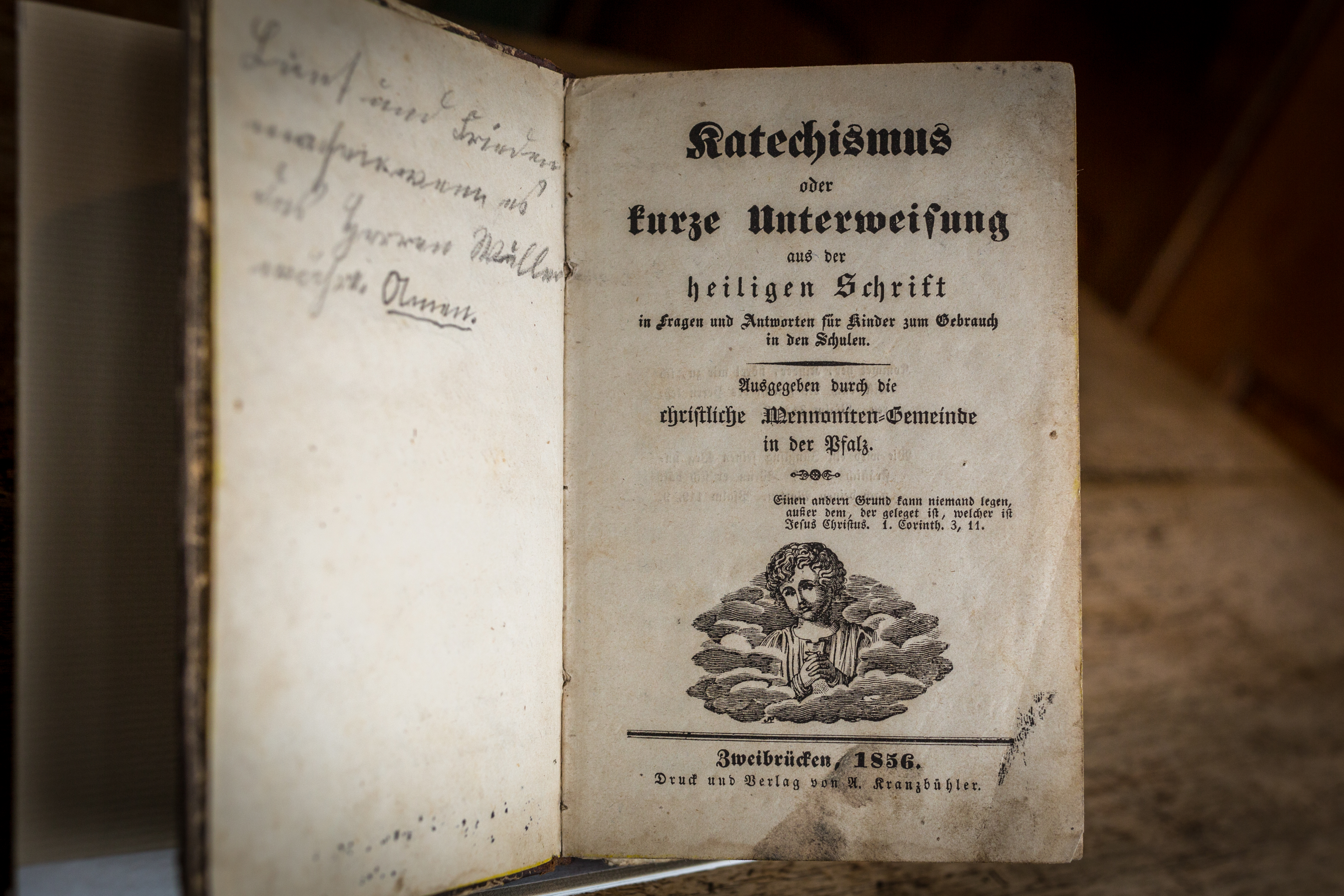 Katechismus oder kurze Unterweisung aus der heiligen Schrift in Fragen und Antworten für Kinder zum Gebrauch in den Schulen. Ausgegeben durch die christliche Mennoniten-Gemeinde in der Pfalz. Zweibrücken 1856. Musée alsacien de Strasbourg.